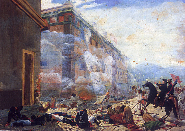 El combate de la Alhóndiga de Granaditas en Guanajuato el 28 de septiembre de 1810, Óleo sobre tela, José Díaz del Castillo, 1910. Archivo/Acervo: Instituto de Cultura de Morelos.